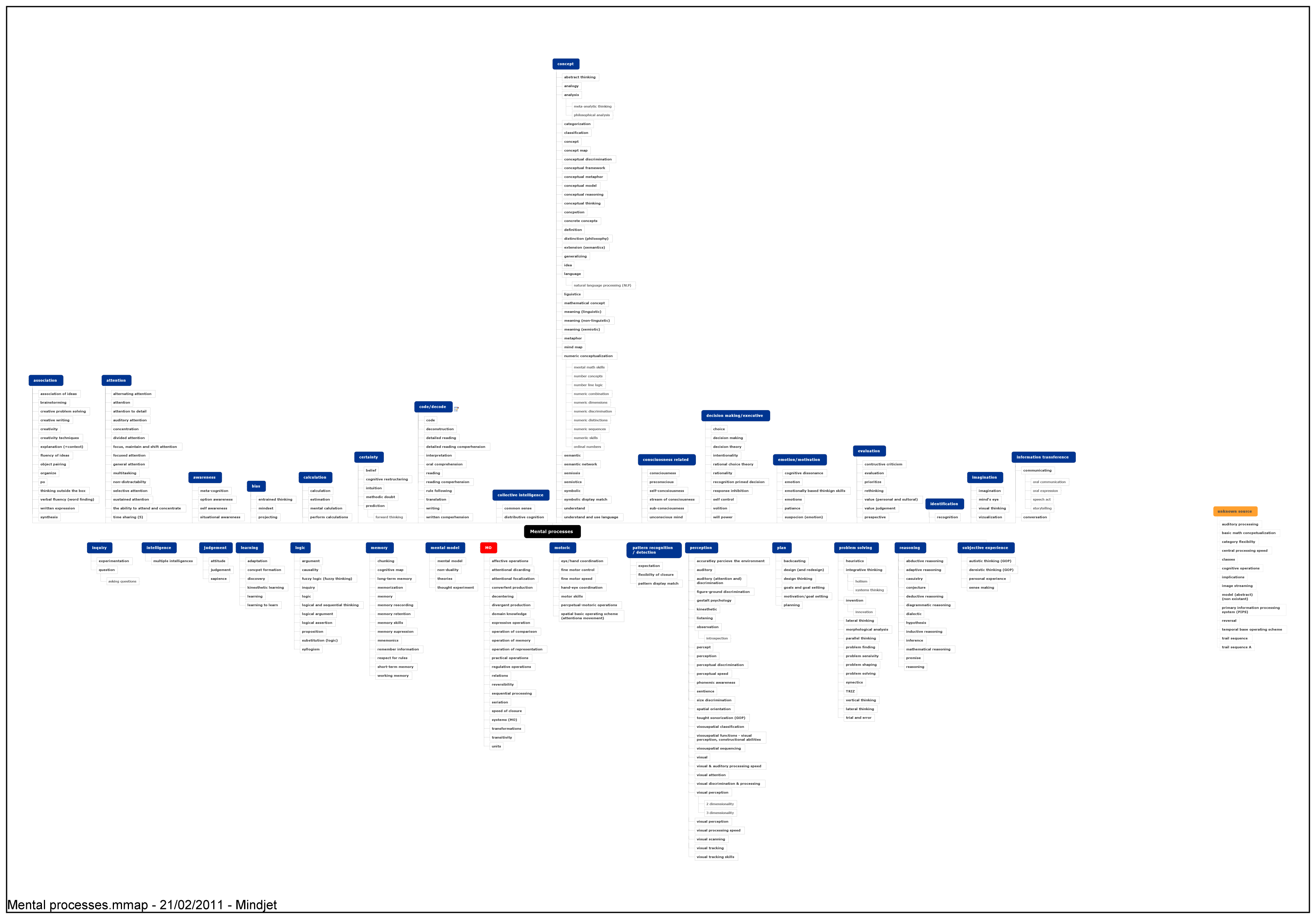 התרשים מתאר אוסף של מיומנויות קוגניטיביות שנאספו ומוינו על-ידי על-מנת לאתר ולקטלג את כל הפעולות שהמוח האנושי יכול לעשות